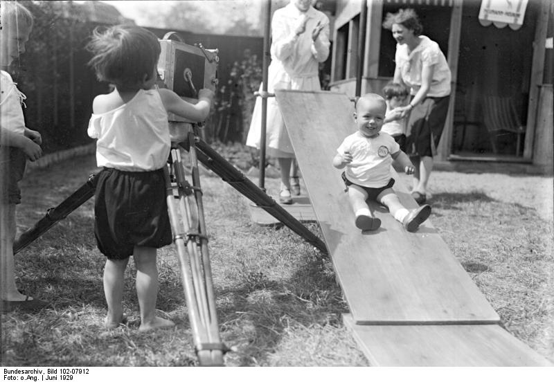 Moderne orthopädische Kinder-Gymnastik nach dem berühmten System Neumann-Neurohde. Die Schwachfussleiter zur Vermeidung der englischen Krankheit und zur Stärkung der Beinmuskeln für 2 bis 3 jährige Kinder. Die Kinder laufen auf den winzigen Sprossen unter Aufsicht hinauf und herunter.